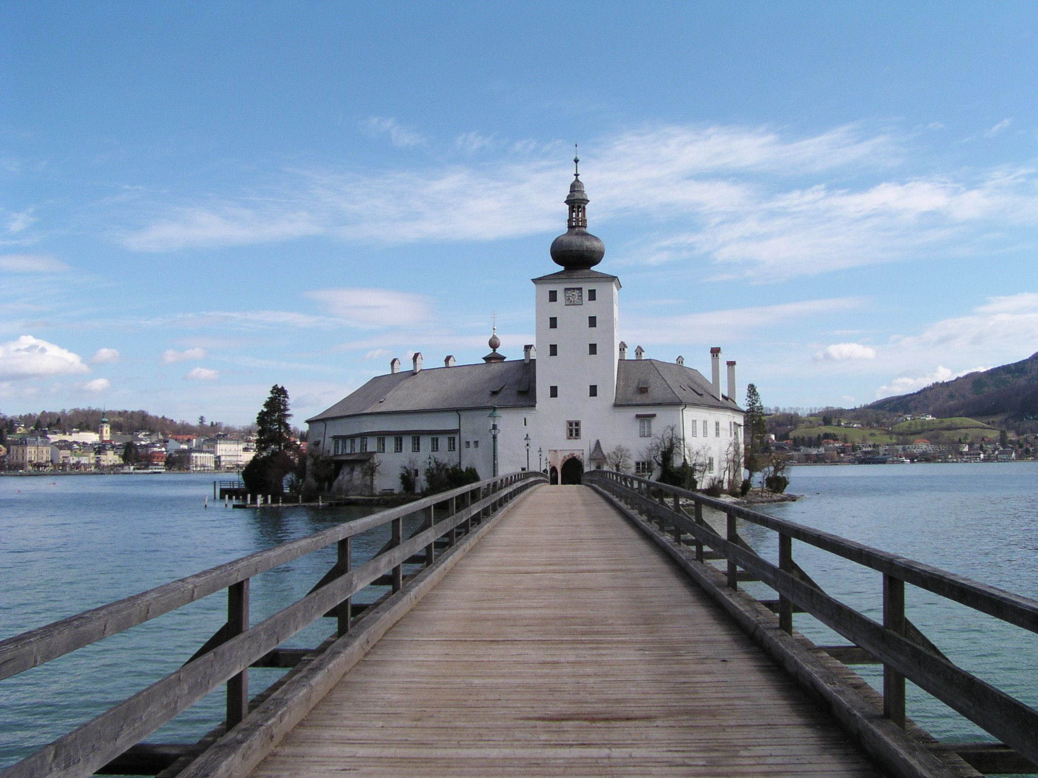 Schloss Ort am Traunsee bei Gmunden, Österreich